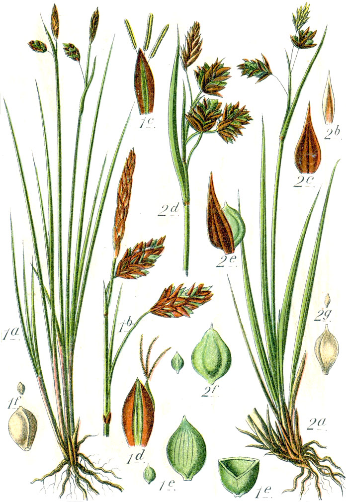 1. Carex limosa L. 2. Carex magellanica Lam. subsp. irrigua (Wahlenb.) Hiitonen, syn. Carex paupercula Michx., Carex irrigua (Wahlenb.) Sm. ex Hoppe Original Caption 1. Schlamm-Segge, Carex limosa 2. Gletscher-Segge, Carex irrigua